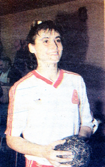 Zawodniczka AZS AWF Wrocław Iwona Nabożna